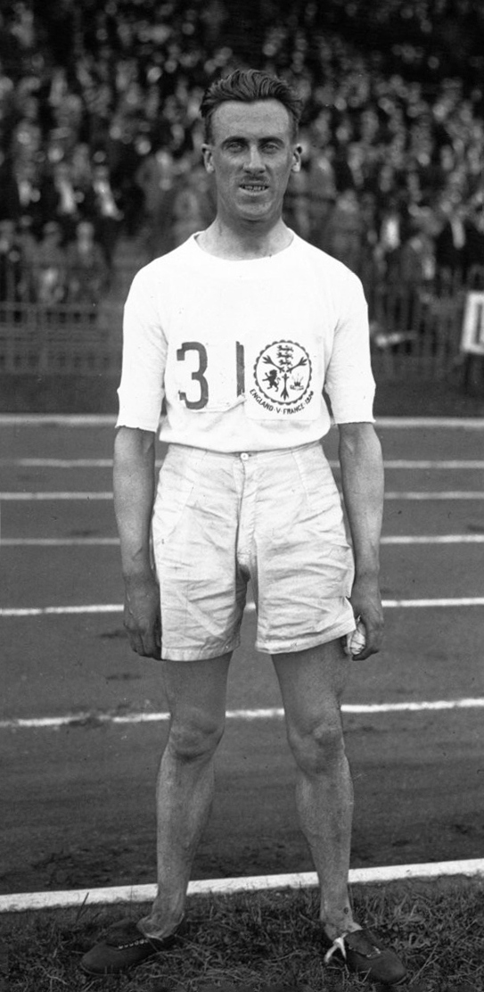 Colombes : match d'athlétisme France Angleterre : Johnston (anglais) gagnant du 5000 m. (portrait) : [photographie de presse] / Agence Meurisse